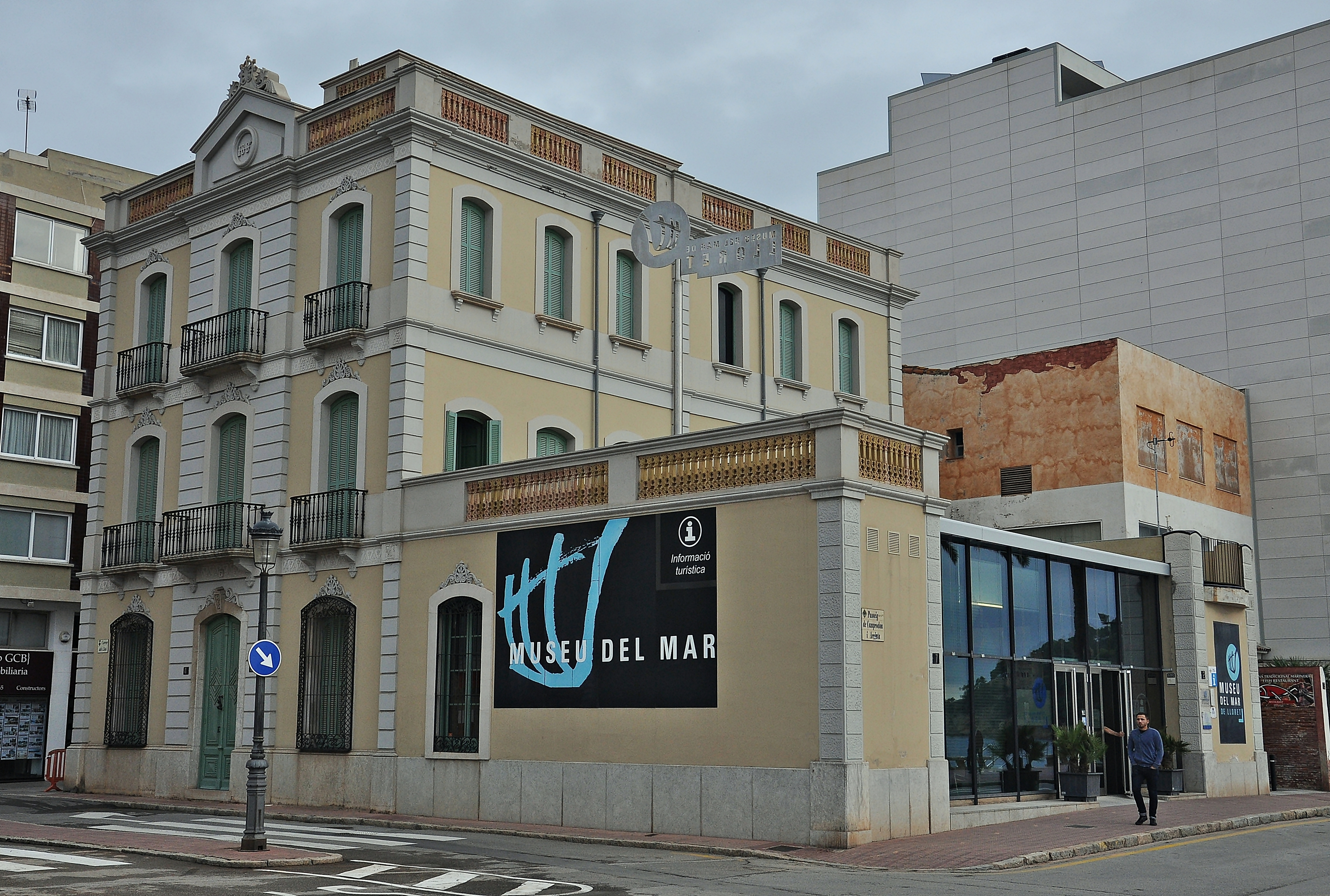 la Selva-2016